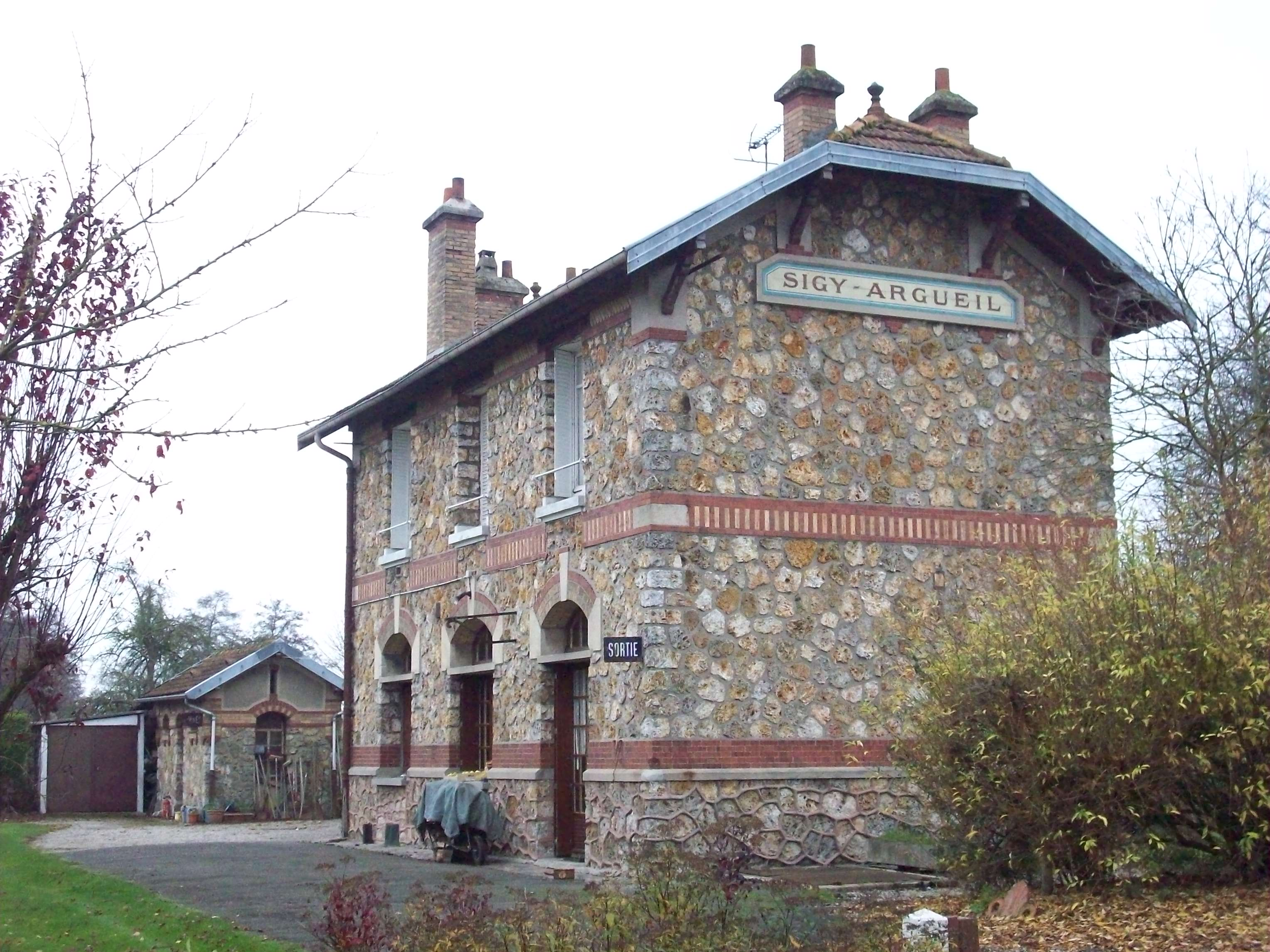 Ancienne gare de Sigy-Argueil, de la ligne Charleval-Serqueux.